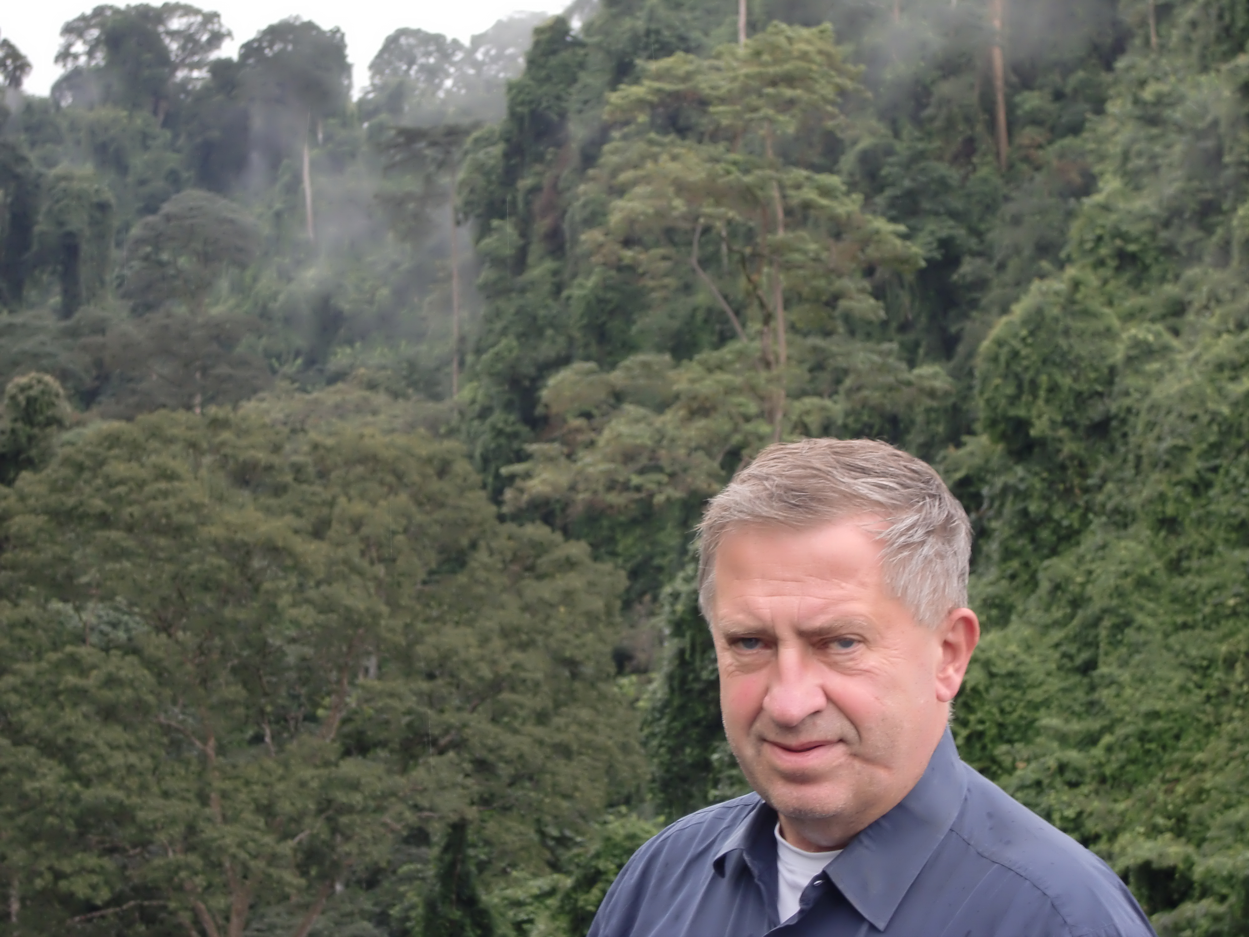 Rüdiger Döhler auf Bioko